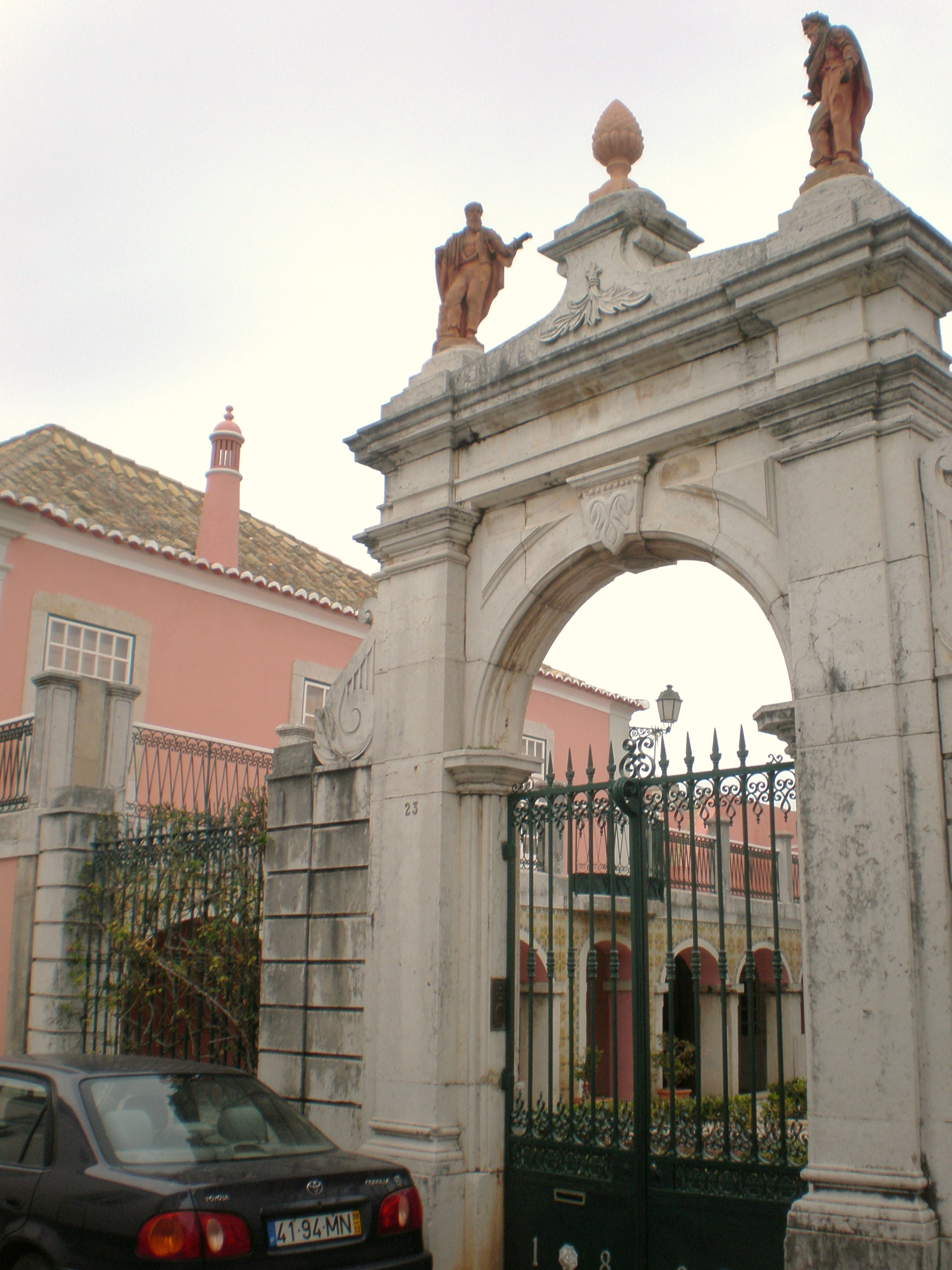 José Maria Assis house, Faro, Portugal